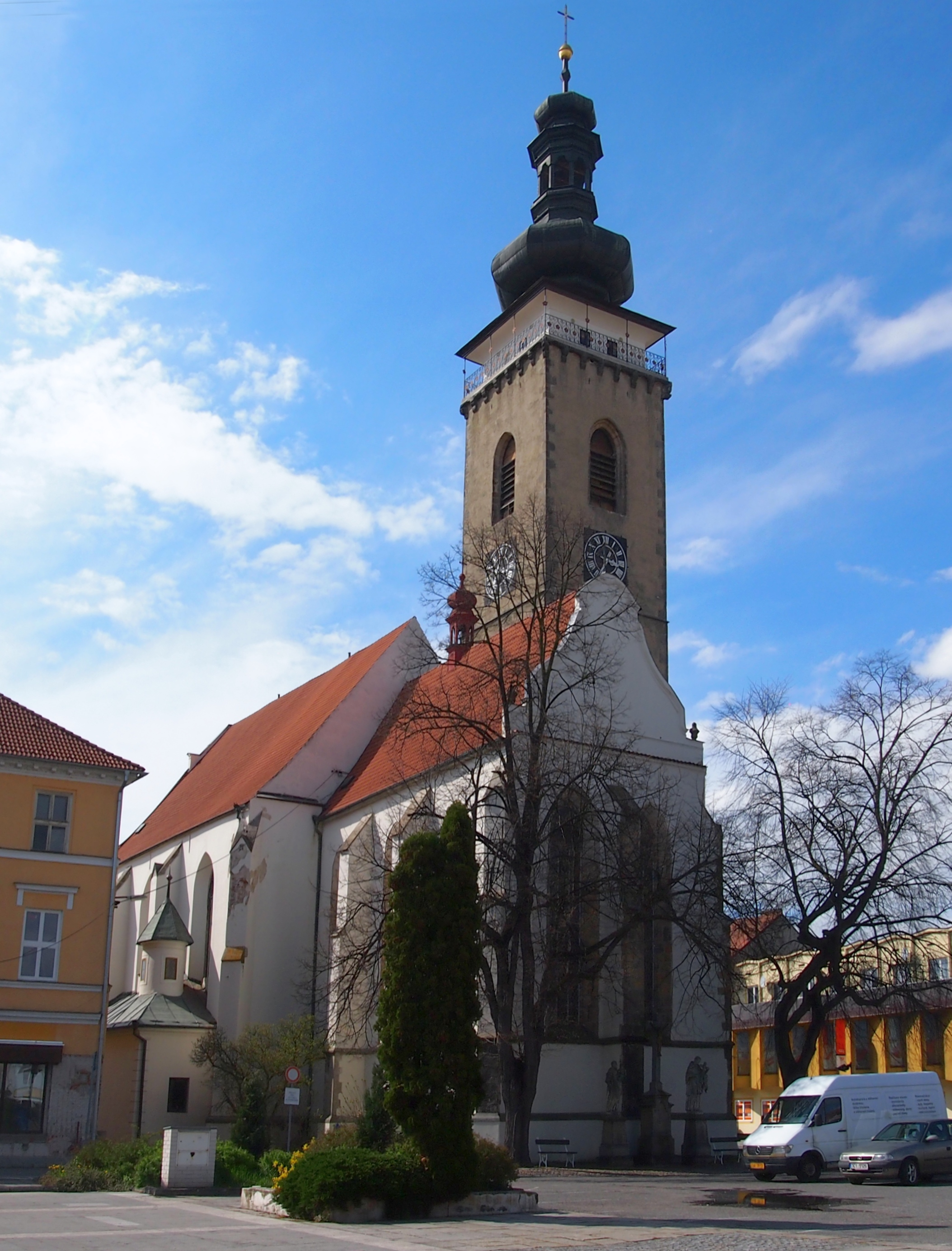 Kostel_svateho_Petra-a-Pavla_3